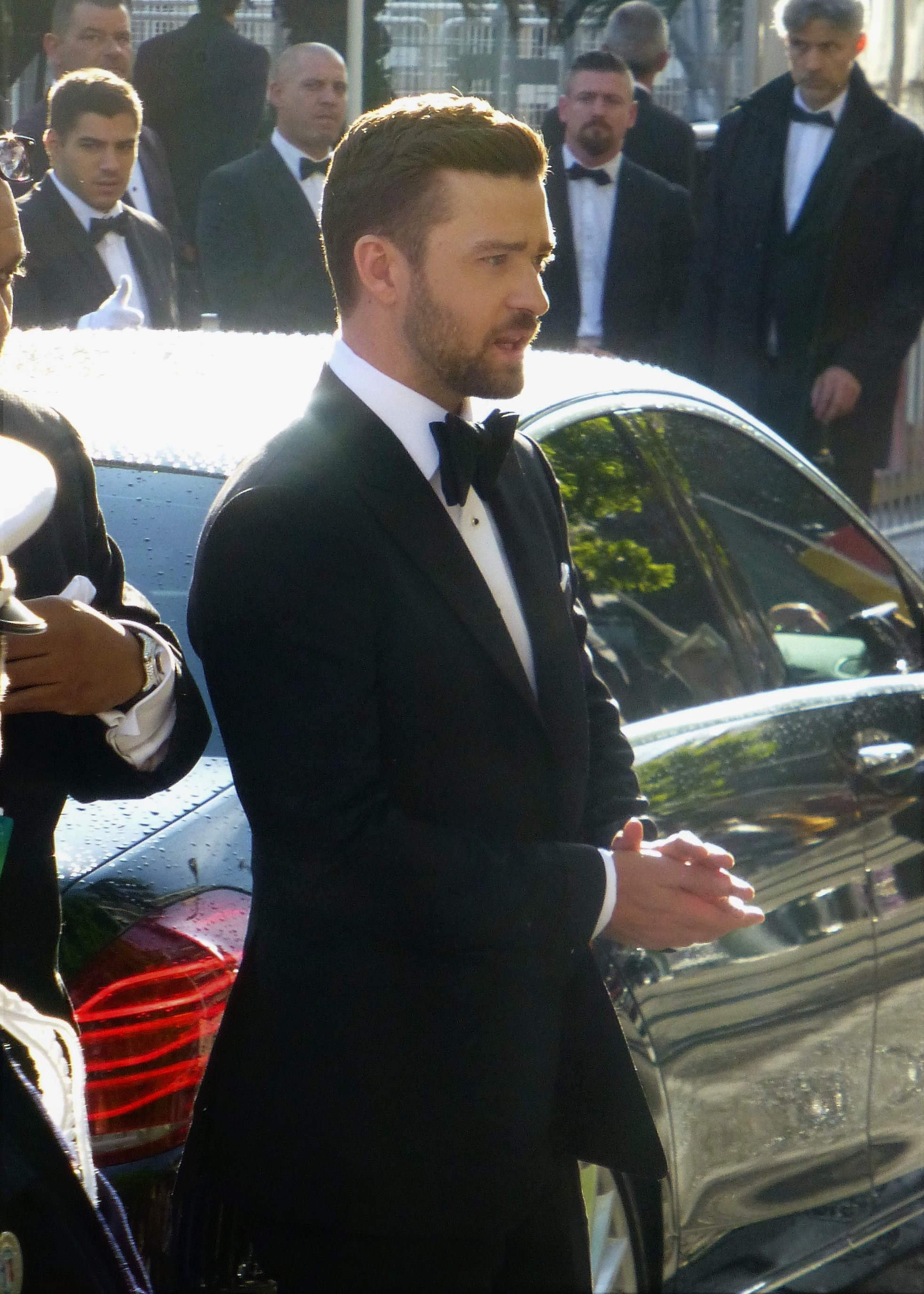 El músico y actor Justin Timberlake promocionando la película Trolls en el Festival de Cine de Cannes 2016.